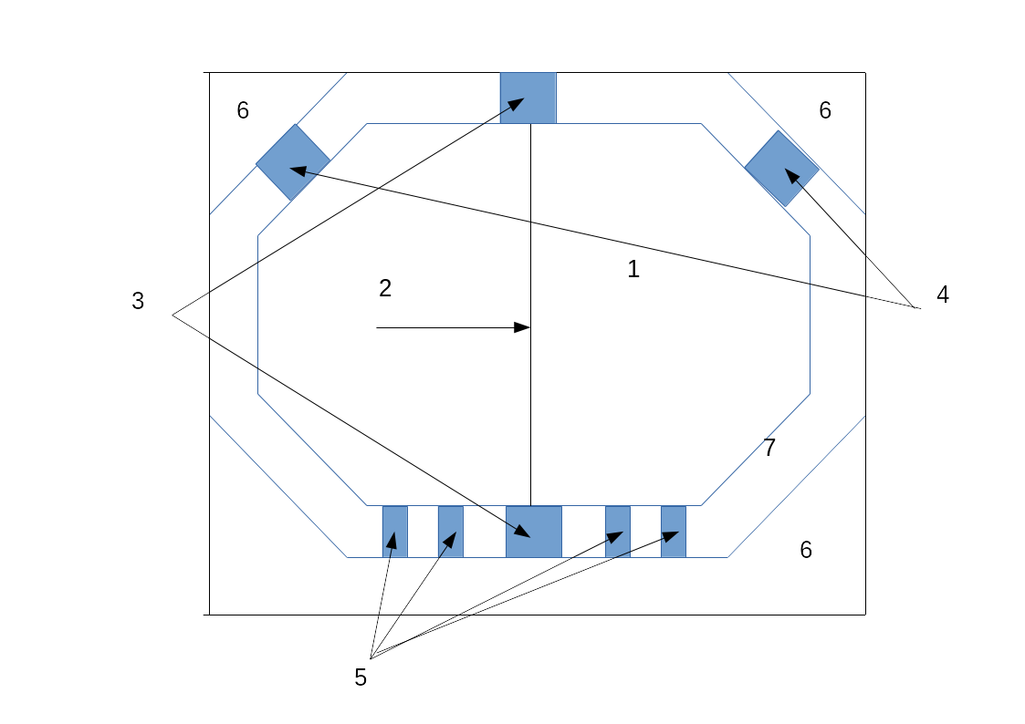 A tipa neatkarīgais tanks